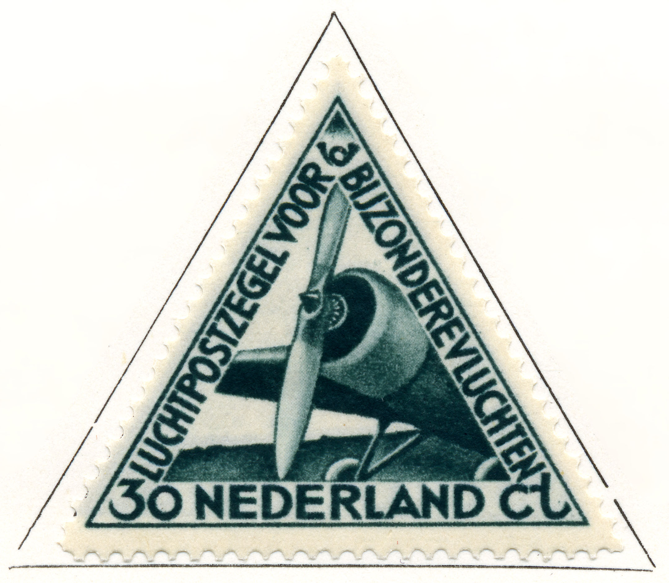 1933 luchtpostzegel voor bijzondere vluchten. Ontwerper Aart van Dobbenburgh